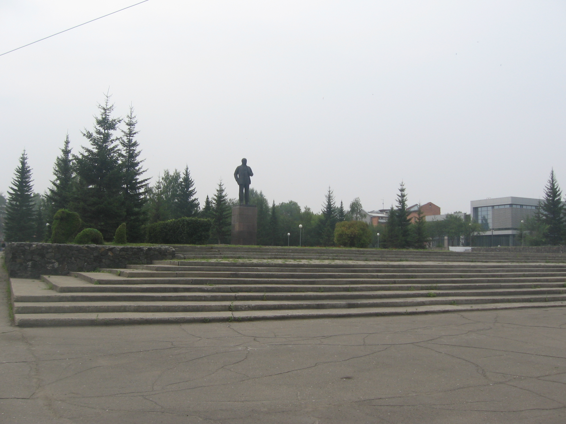 Иркутская область